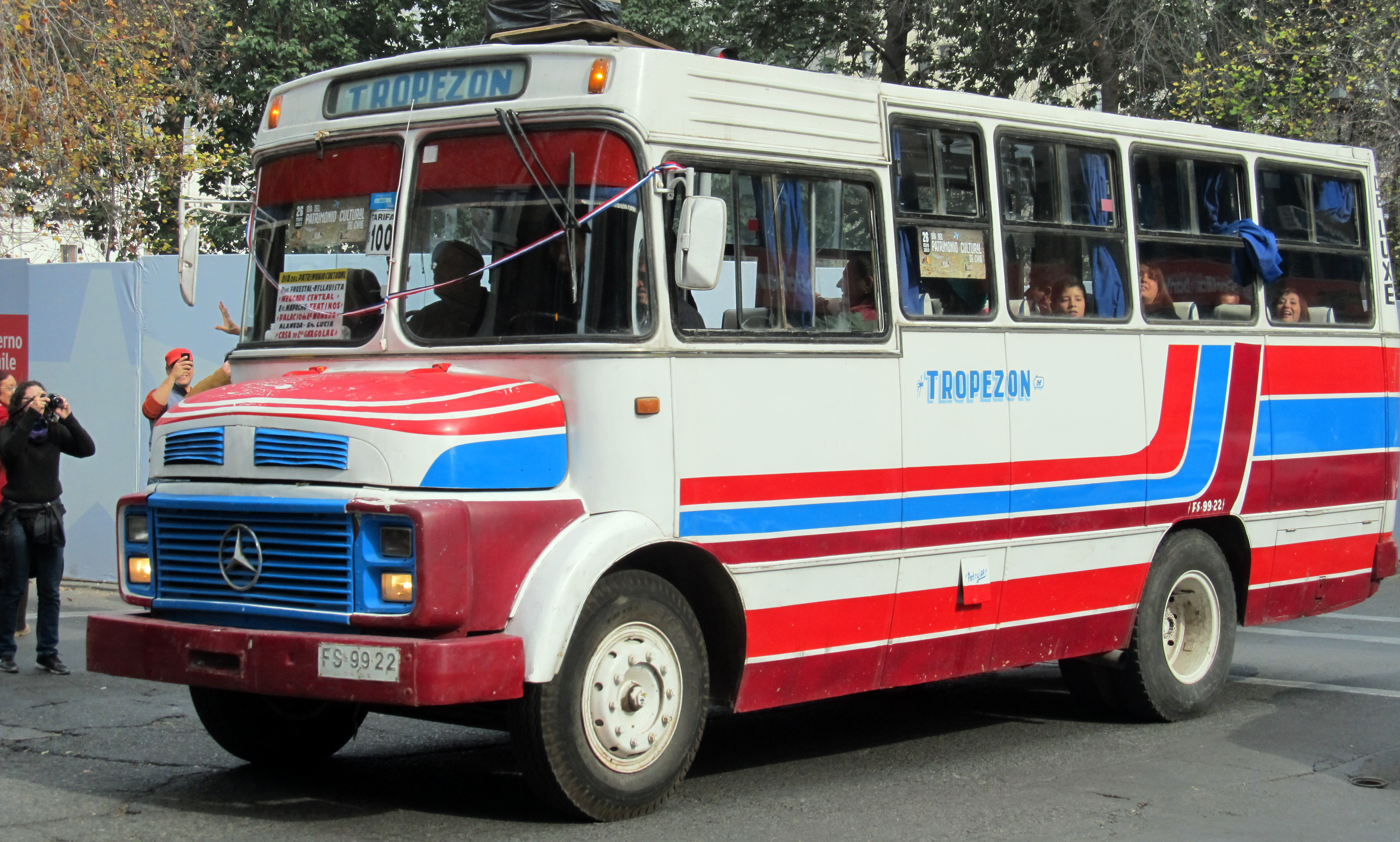 Autobús (micro) de la línea Tropezón, que funcionaba durante de la década de 1980 en Santiago de Chile.